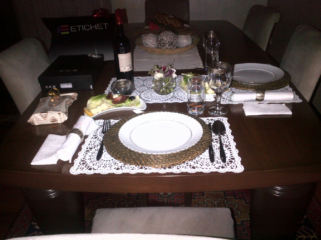 "Sofra" per a dos.